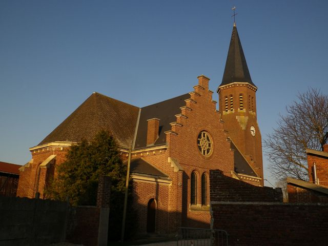 Église Saint-Martin d'Izel-lès-Equerchin